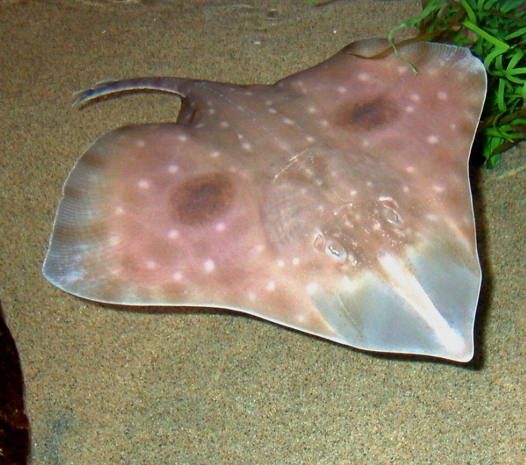 Big skate (Beringraja binoculata - synonym: Raja binoculata) at SeaWorld.